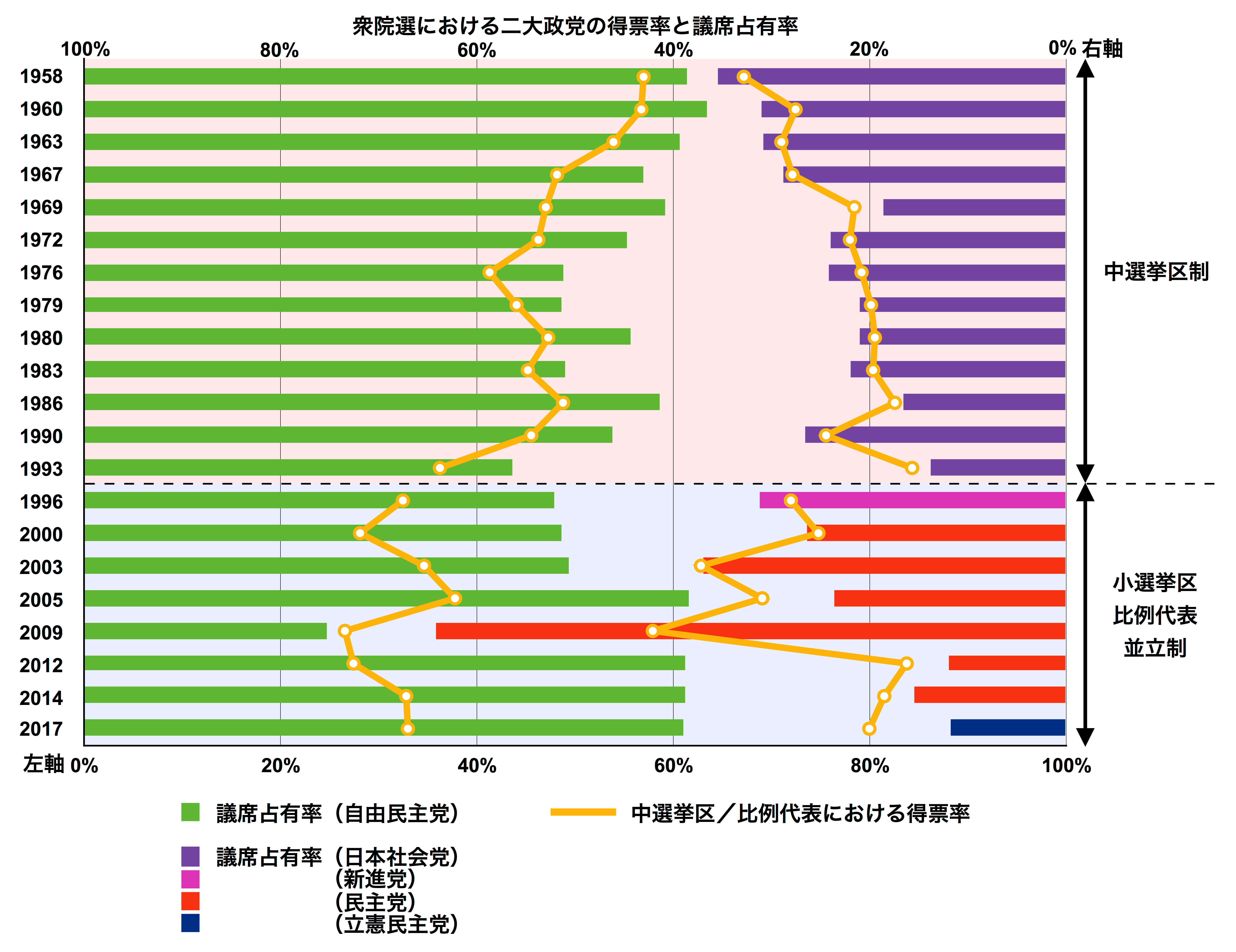 衆議院選挙における主要二政党の得票率と議席占有率